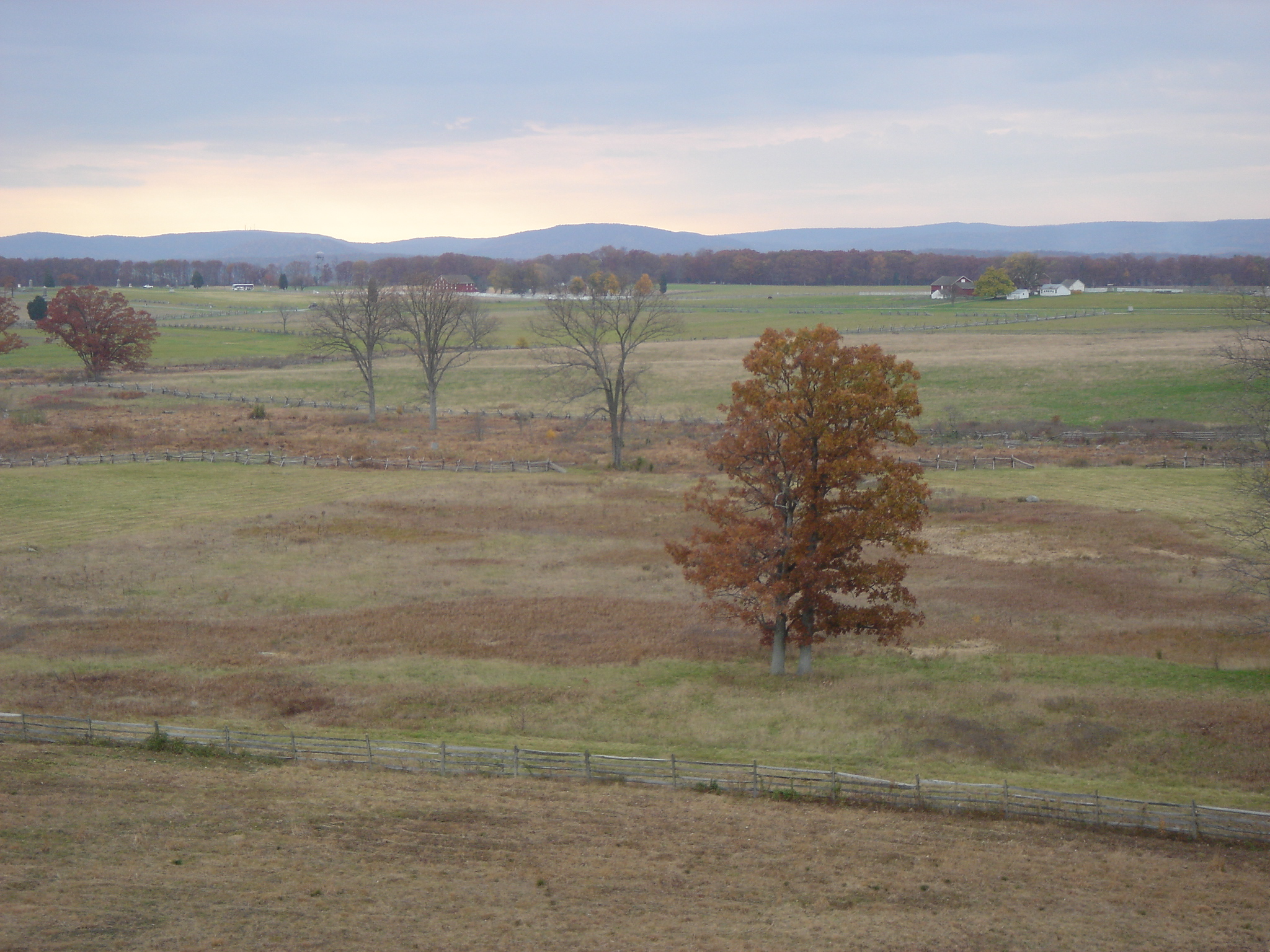 Battlefield at Gettysburg, Pennsylvania